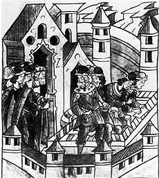 Ярославль. Закладка Спасского собора. Миниатюра XVI в. из Лицевого летописного свода